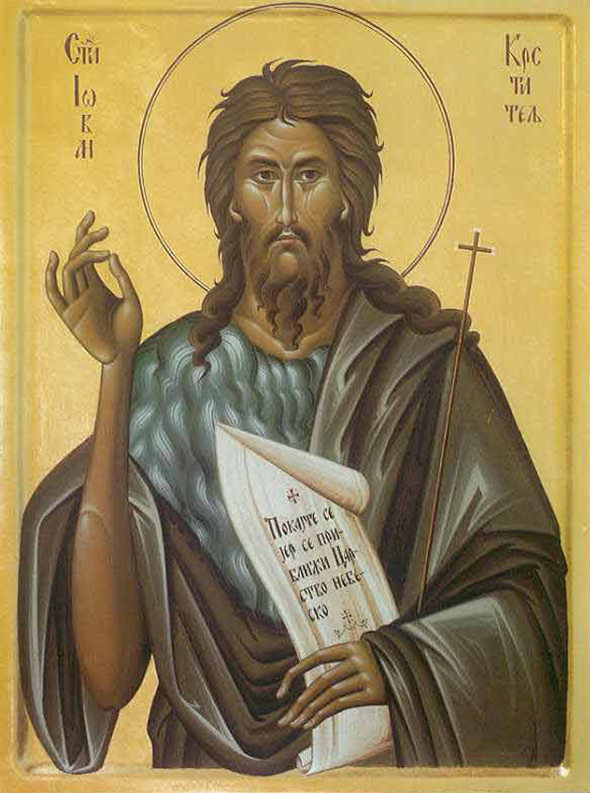 Sveti Jovan Krstitelj